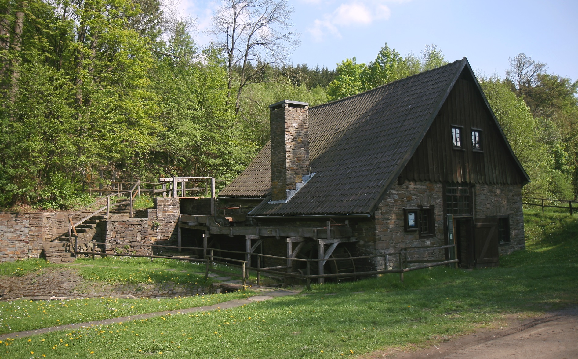 Hammerwerk, Museum Wendener Hütte in Wenden.